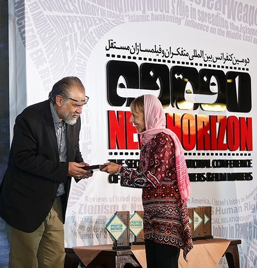 مدیا بنجامین در مراسم اختتامیه دومین کنفرانس بین المللی متفکران و فیلمسازان مستقل (افق نو)